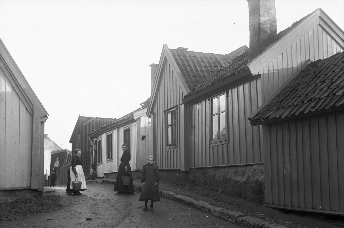 Langleiken, 1903. Foto: Anders Beer Wilse/Oslo Museum.